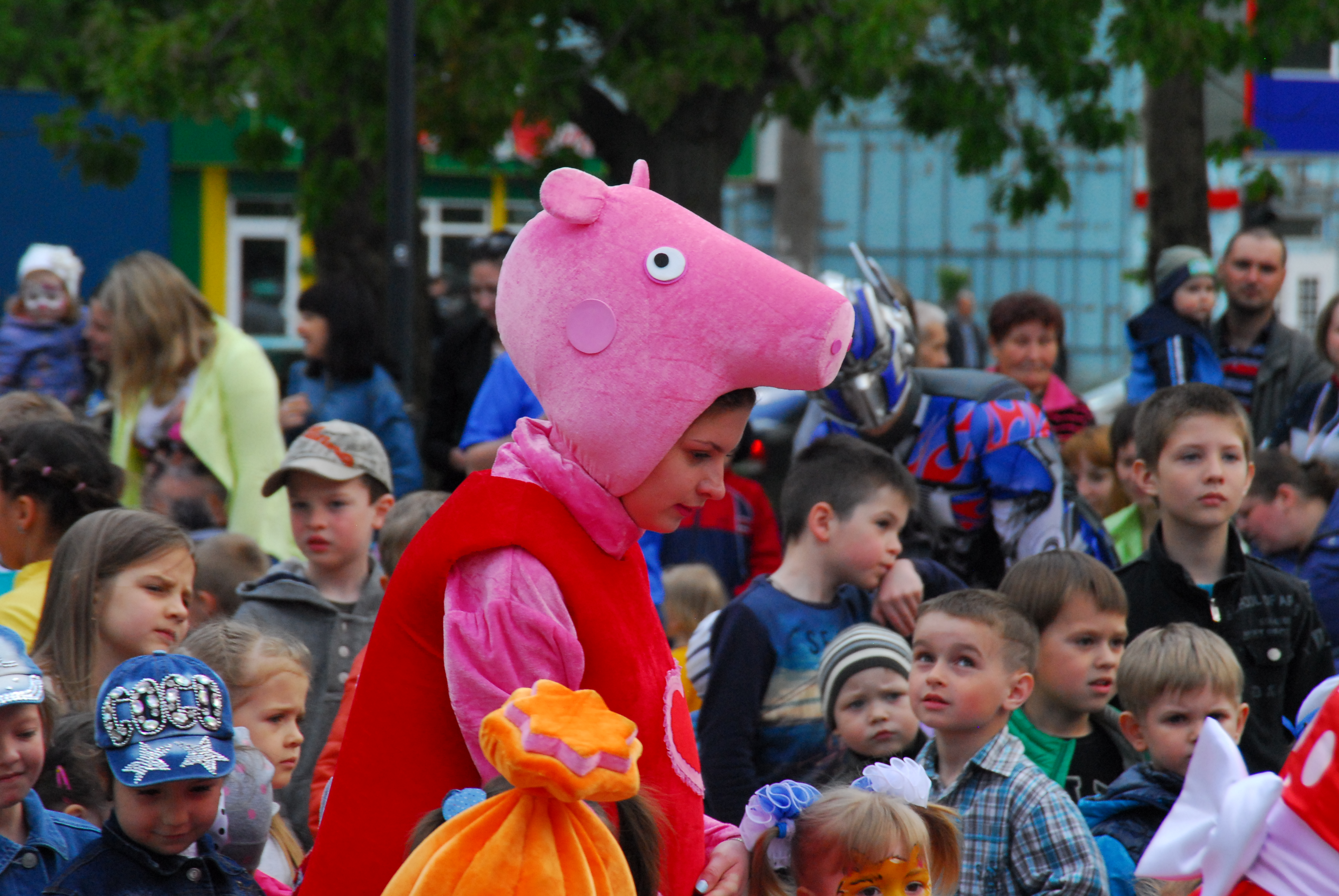 Праздник для детей